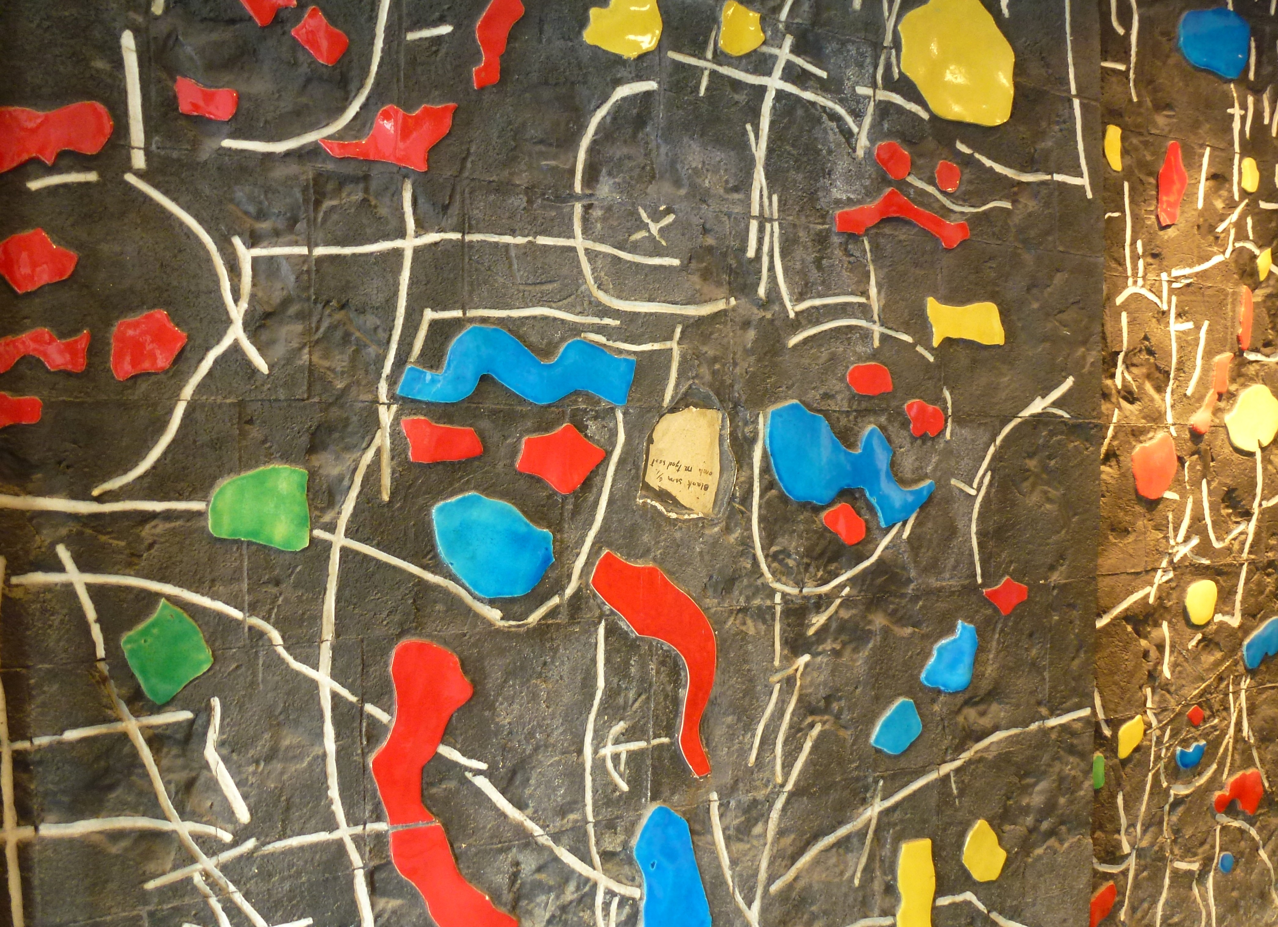 Konstnärlig utsmyckning DN-huset: Lennart Rodhe "Dag och natt" (1967)